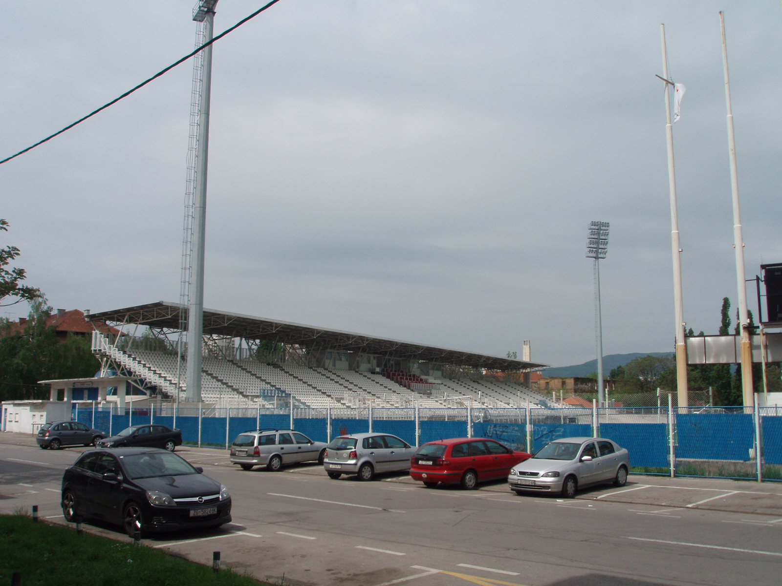 Stadion u Kranjčevićevoj